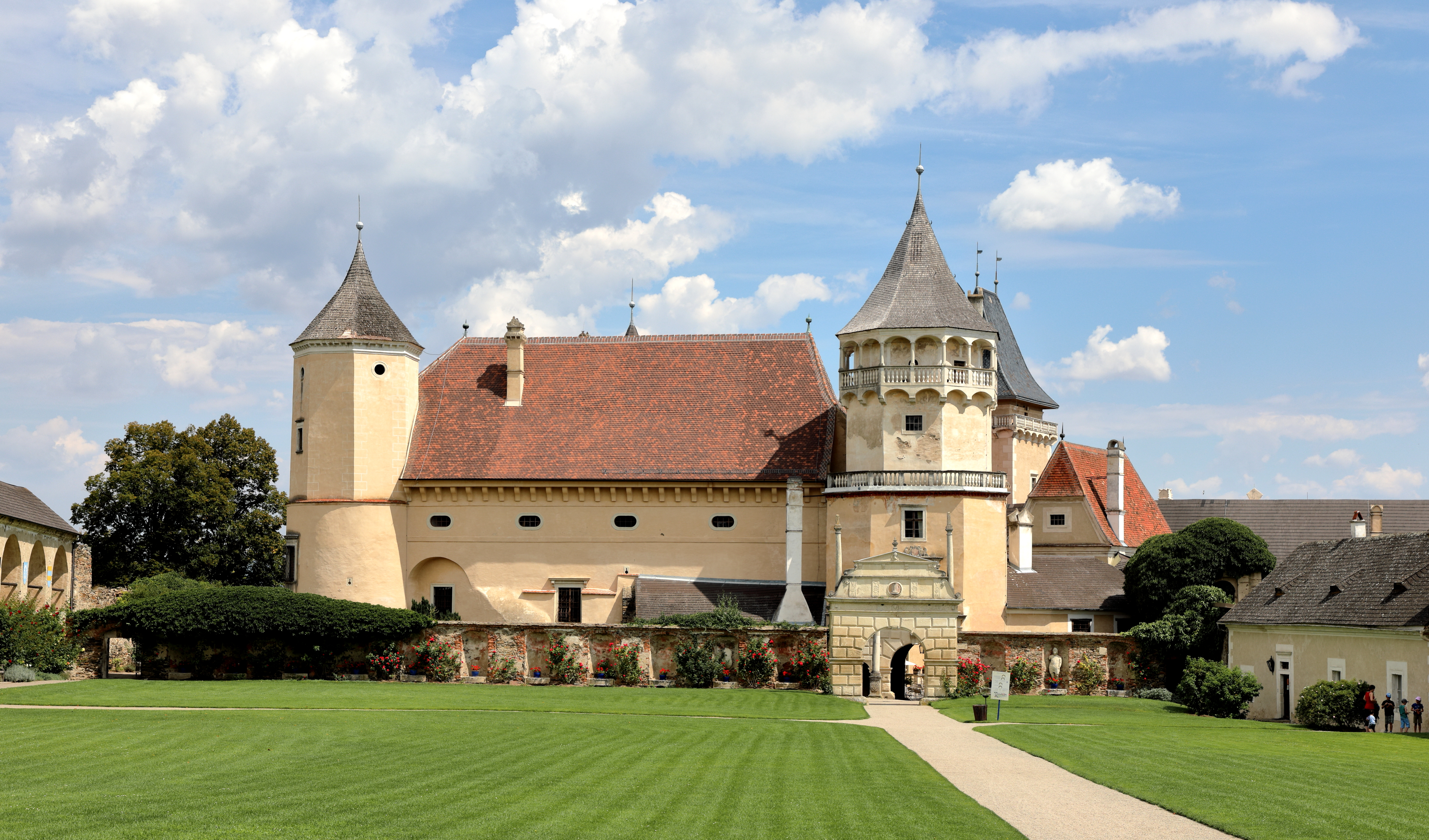 Südwestansicht der „Vorburg“ des Schlosses Rosenburg in Rosenburg, ein Ortsteil der niederösterreichischen Gemeinde Rosenburg-Mold.Ursprünglich eine mächtige mittelalterliche Burg in Berglage über dem Kampufer. Ende des 16. Jahrhunderts erfolgte ein Umbau zu einem Renaissanceschloss und in der 2. Hälfte des 17. Jahrhunderts ein weiterer Ausbau. Nach einem Brand 1800 verfiel das Schloss. Zwischen 1859 und 1875 ließ Ernst Karl von Hoyos-Sprinzenstein die vom Verfall bedrohte Rosenburg nach den Darstellungen des Schlosses in der Topographia Windhagiana von 1673 orientierend, umfassend restaurieren und machte sie als eine der ersten Burgen in Österreich öffentlich zugänglich.